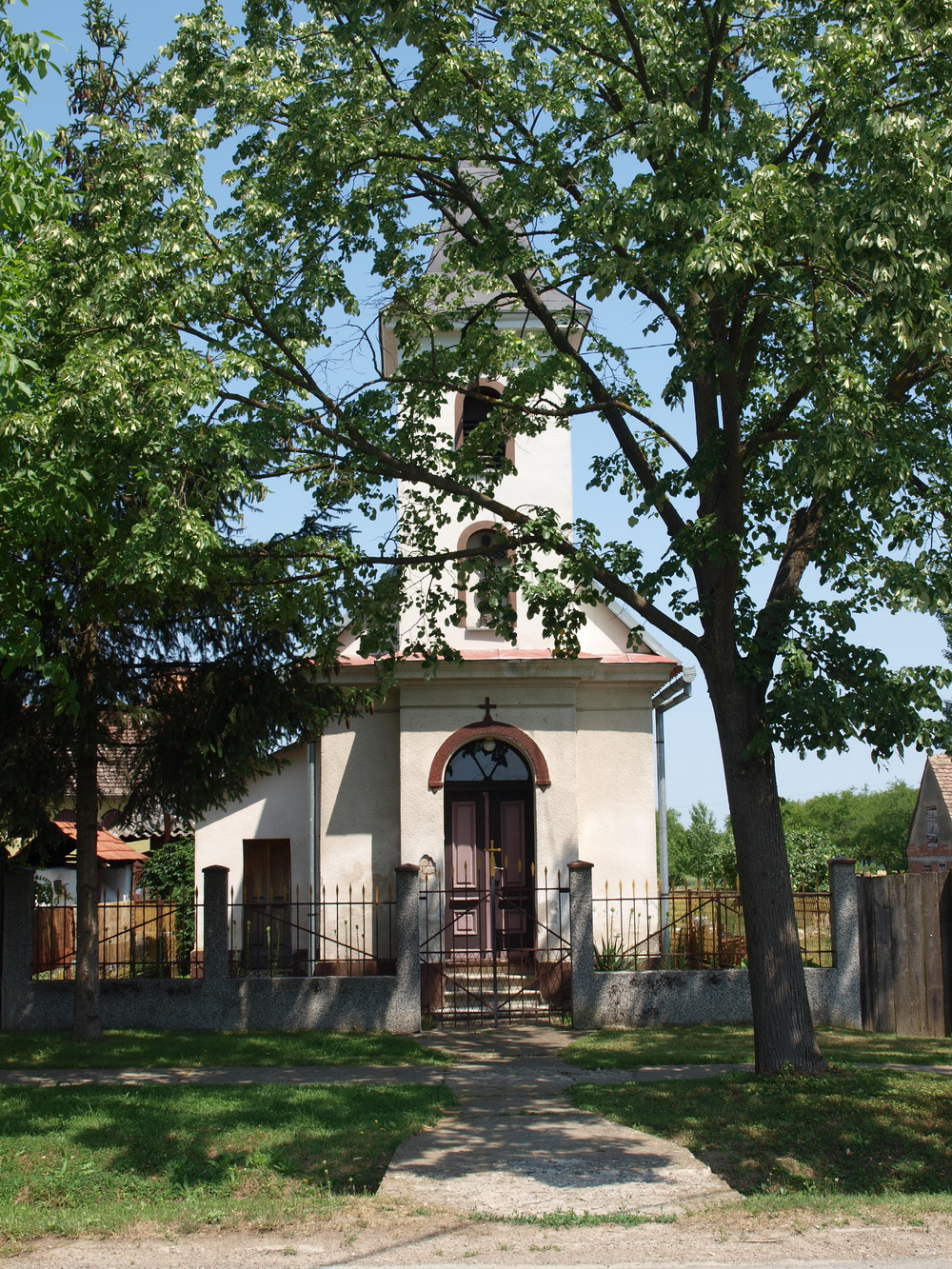 Crkva u selu Selna, Brodsko-posavska županija.